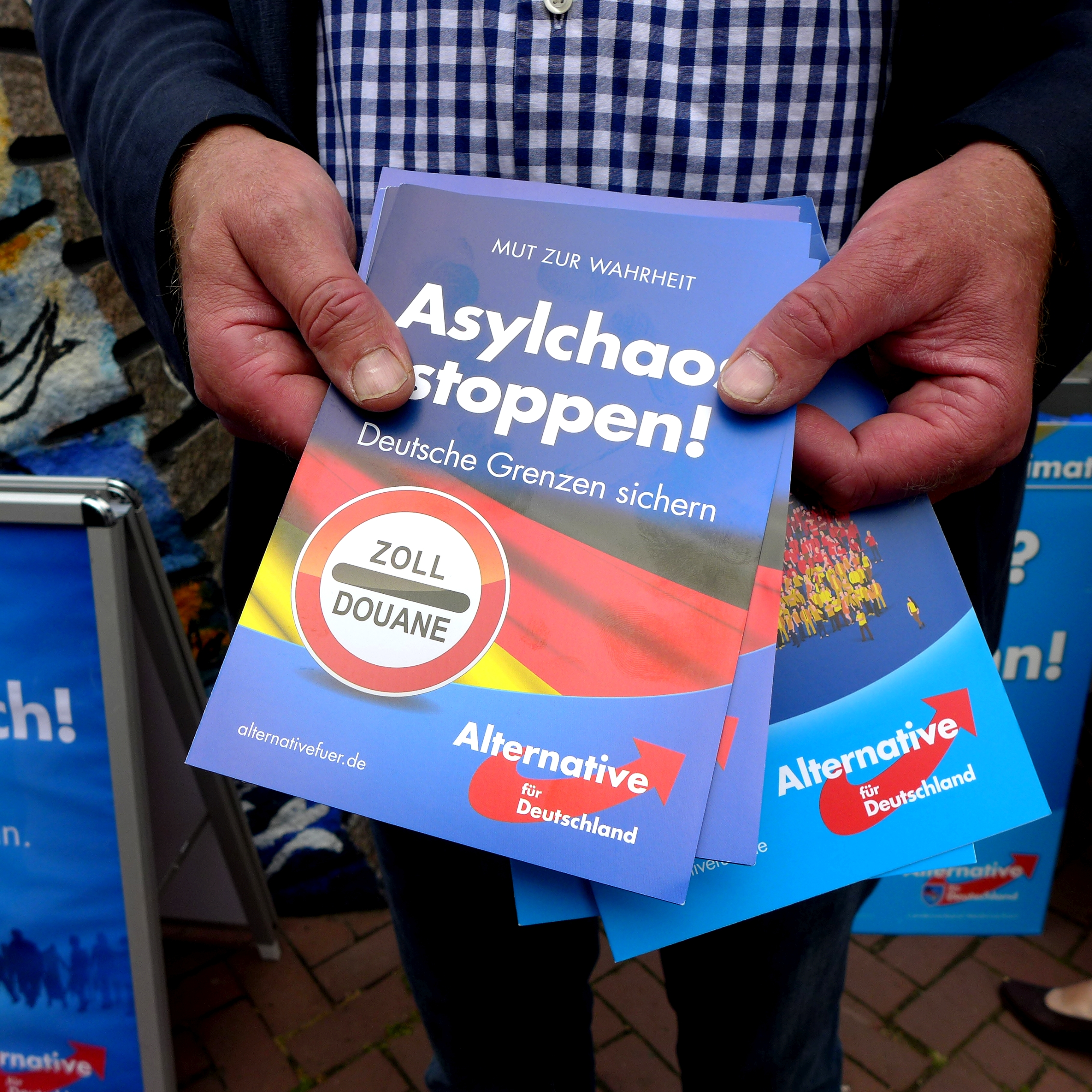 Verteilung von Flyern der Alternative für Deutschland zur Niedersächsischen Kommunalwahl am 11. September 2016. Aufnahmedatum 2016-08.